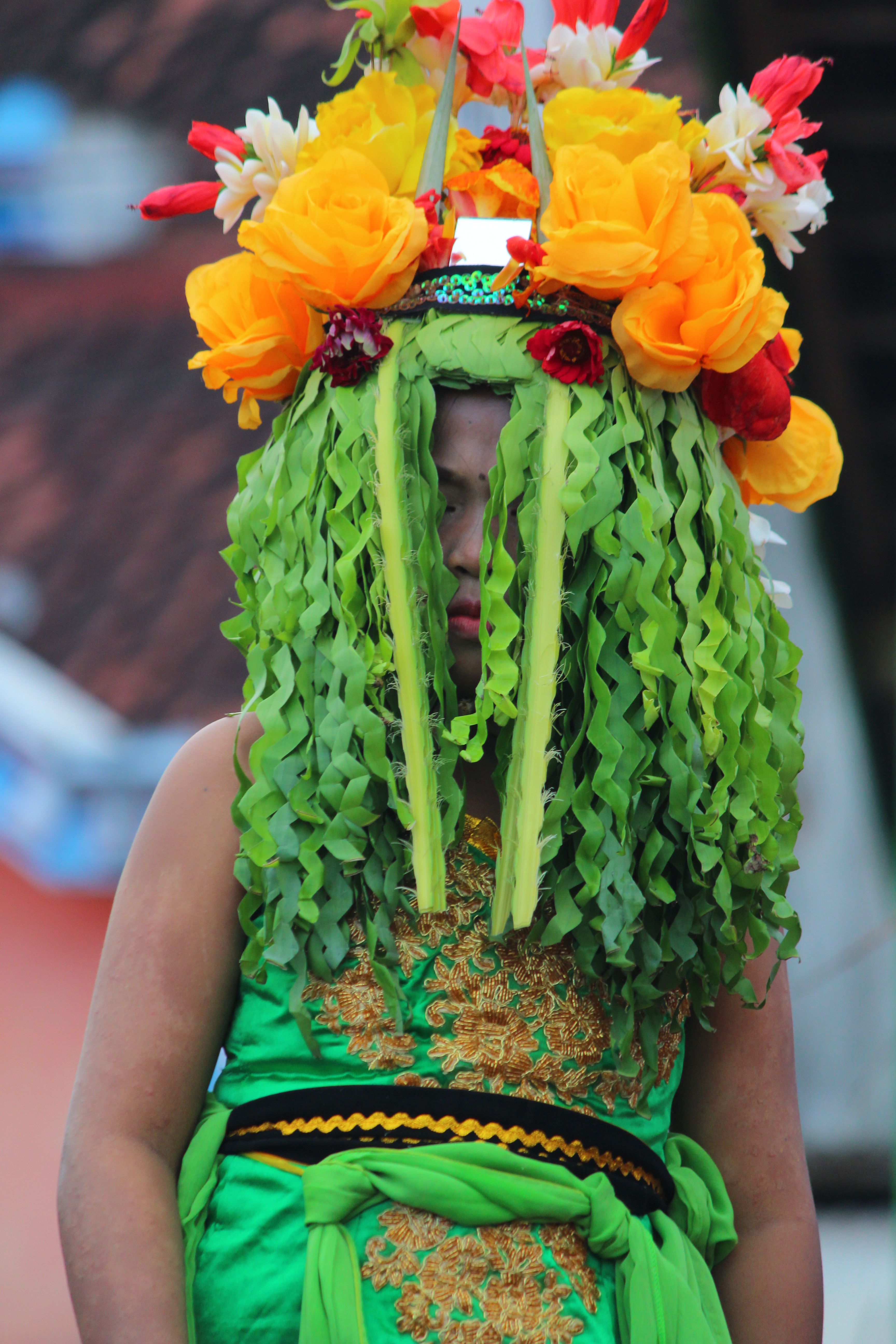 Seblang Olehsari adalah suatu ritual upacara adat di desa Olehsari Banyuwangi jawa timur yang diadakan pada 7 hari berturut-urut dengan keadaan tidak sadarkan diri dalam menarinya. Tradisi adat ini diadakan pada H+7 Idul Fitri